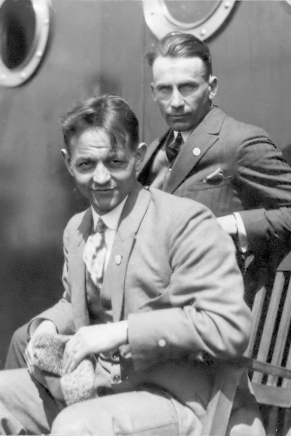 Wout Buitenweg (voor) en Harry Dénis op de boot richting Kopenhagen. Denemarken - Nederland (4-1), gespeeld op 13 juni 1926 in het Idraetsparken te Kopenhagen 1926